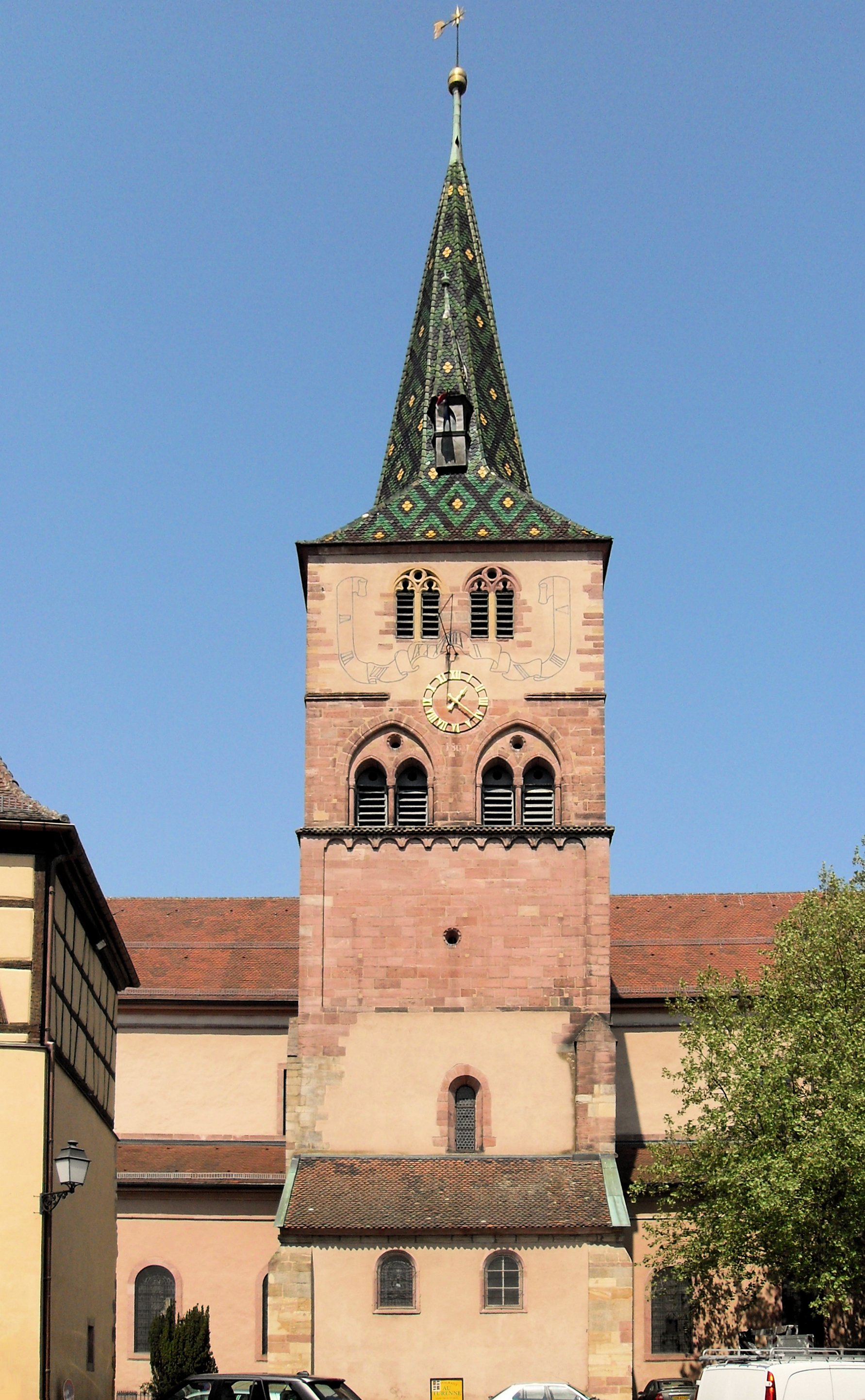 Tour d'église Sainte-Anne à Turckheim